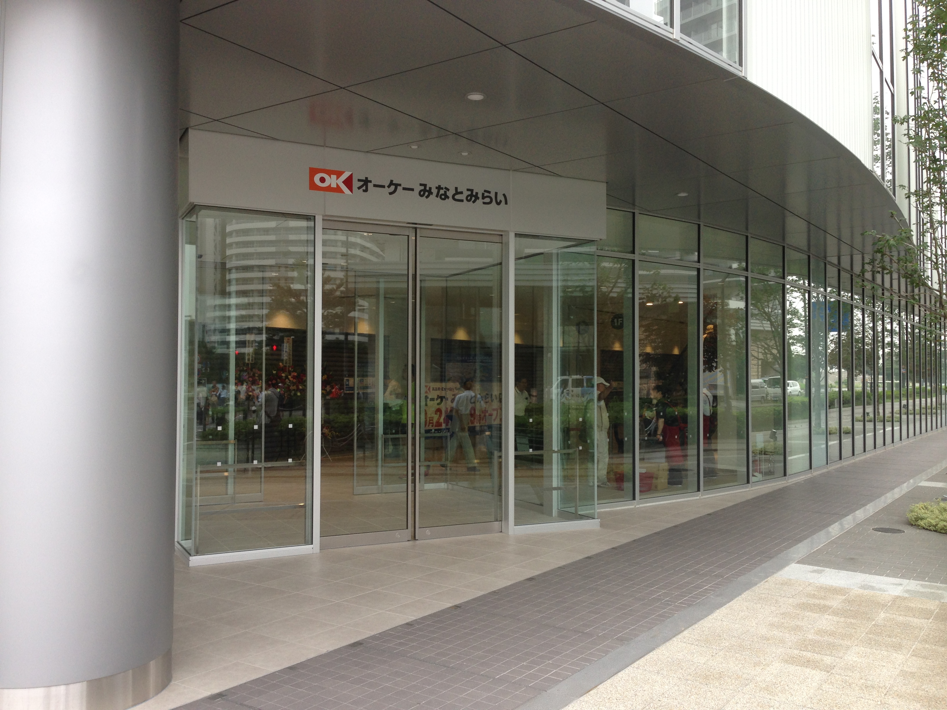 オーケー本社ビルの低層部（2階）に出店する同社スーパーの旗艦店「オーケーみなとみらい店」。